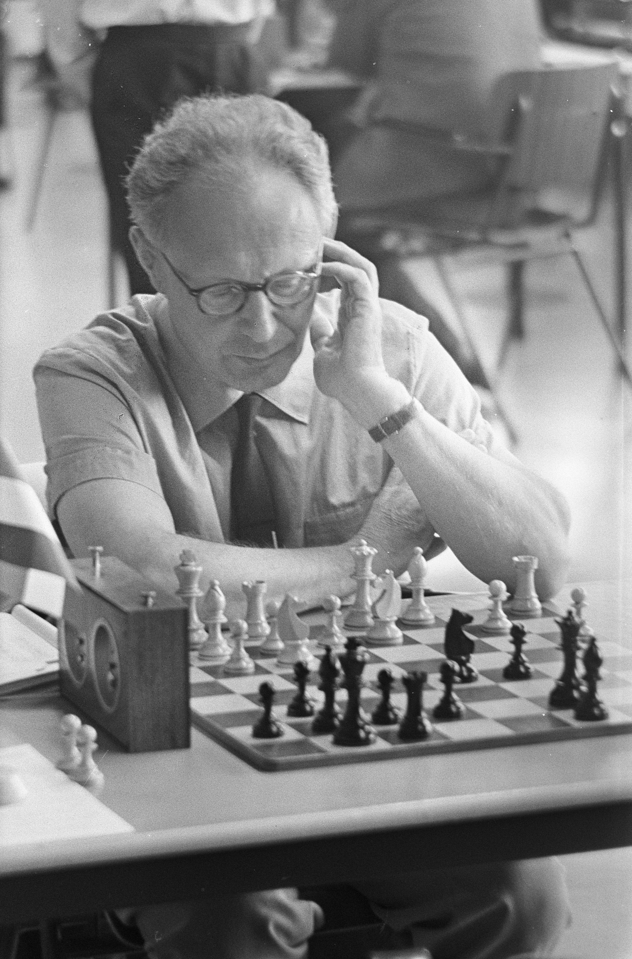 Collectie / Archief : Fotocollectie Anefo Reportage / Serie : [ onbekend ] Beschrijving : IBM-schaaktoernooi, de Rus dr. ir. M.M. Botwinnik aan het bord Datum : 11 juli 1966 Locatie : Rusland Trefwoorden : schaken Persoonsnaam : Dr. Ir. M.M. Botwinnik Instellingsnaam : IBM-Schaaktoernooi Fotograaf : Nijs, Jac. de / Anefo Auteursrechthebbende : Nationaal Archief Materiaalsoort : Negatief (zwart/wit) Nummer archiefinventaris : bekijk toegang 2.24.01.05 Bestanddeelnummer : 919-3429